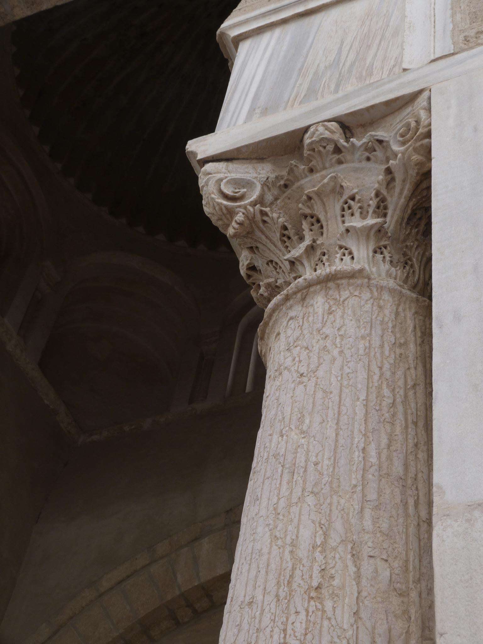 Partie supérieure d'une colonne ornant le porche de Bab Lalla Rihana de la Grande Mosquée de Kairouan, en Tunisie.